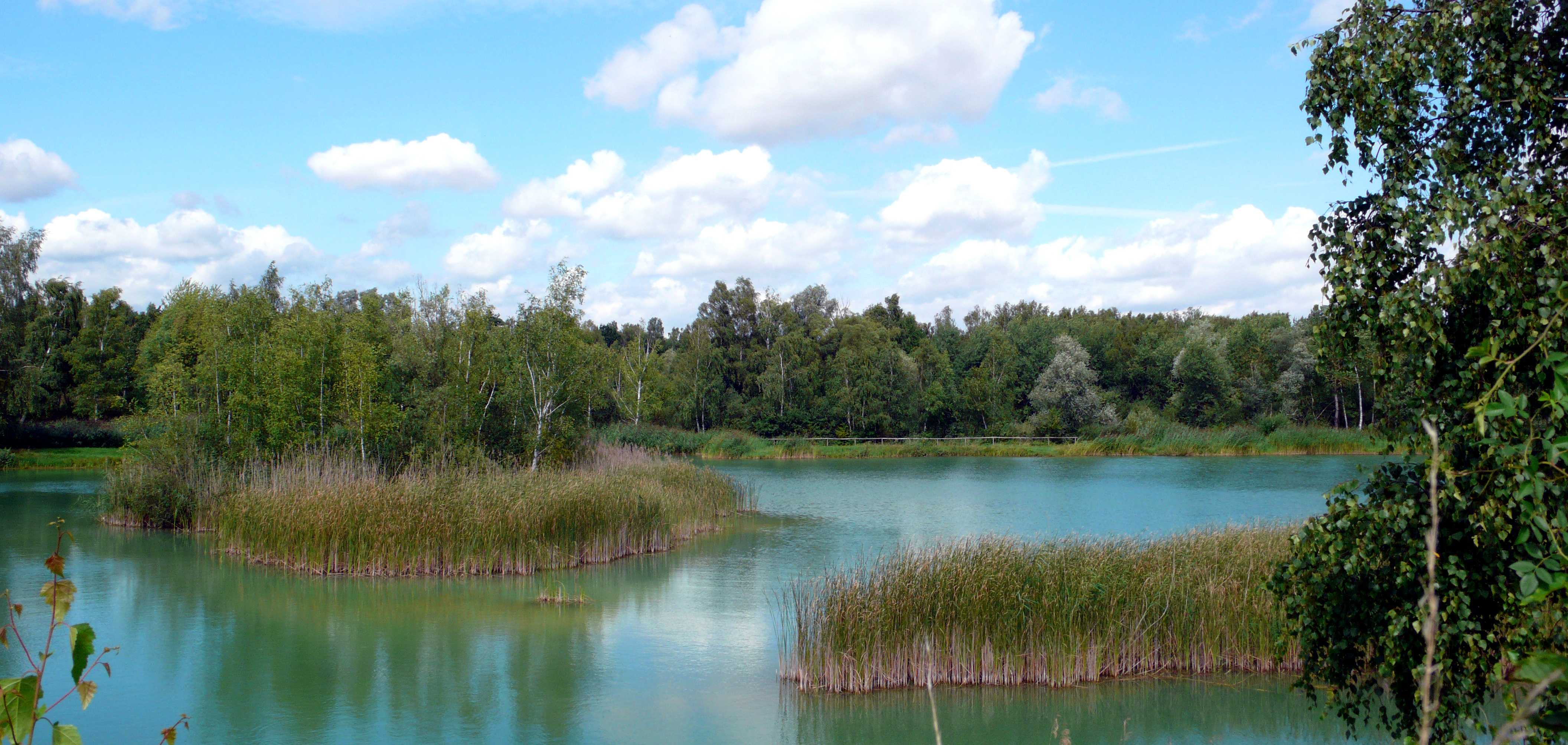 See im Landschaftsschutzgebiet Erdekaut bei Eisenberg (Pfalz)